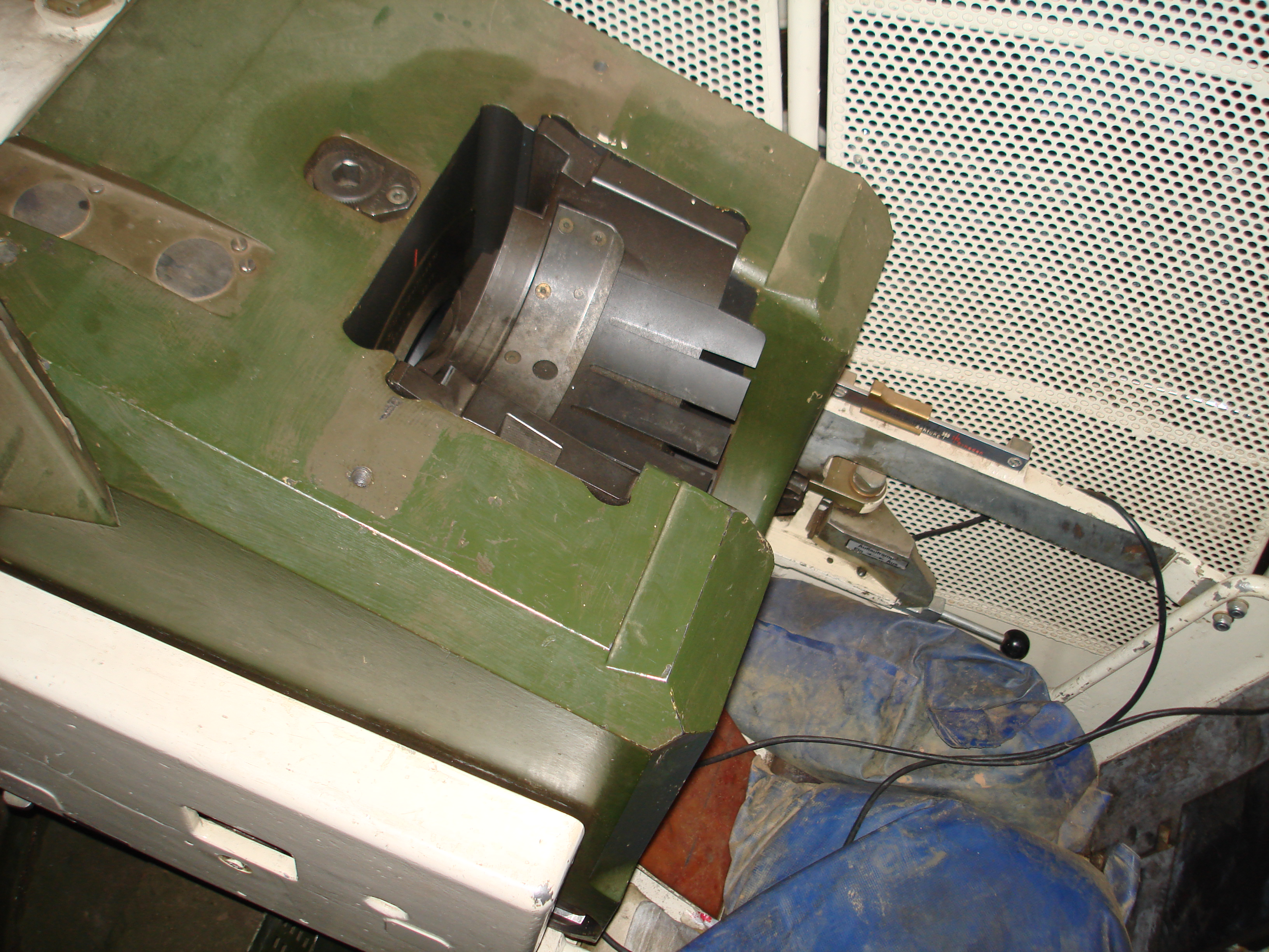 Bodenstück der 120 mm Glattrohrkanone L/44 von Rheinmetall in einem Leopard 2A4. Der Hebel (unten rechts) an der Auflauframpe verhindert beim umlegen, dass der Verschluss nach dem Schuss selbständig öffnet und den Hülsenstummel in den Hülsenkasten (unterhalb des Bodenstücks) auswirft. Oberhalb des Hebels die Rohrrücklaufanzeige.